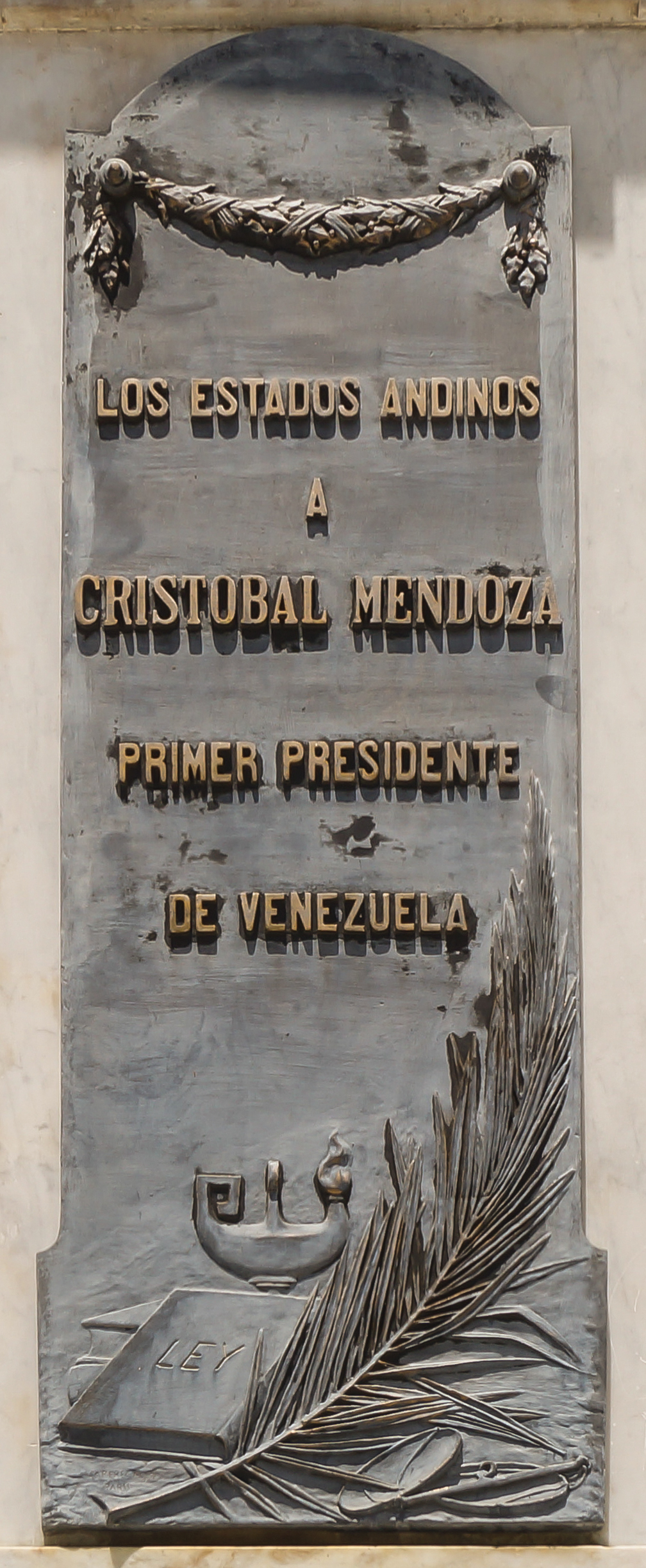 Placa en honor Cristóbal Mendoza. Trujillo.